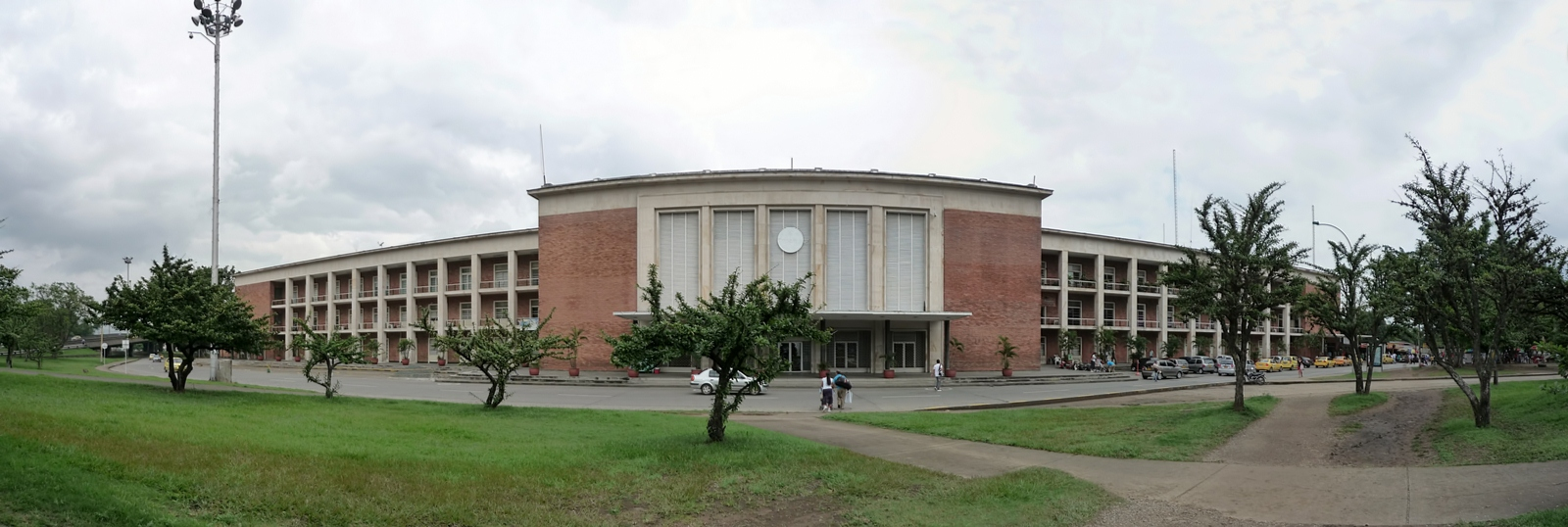 Estación del Ferrocarril Cali